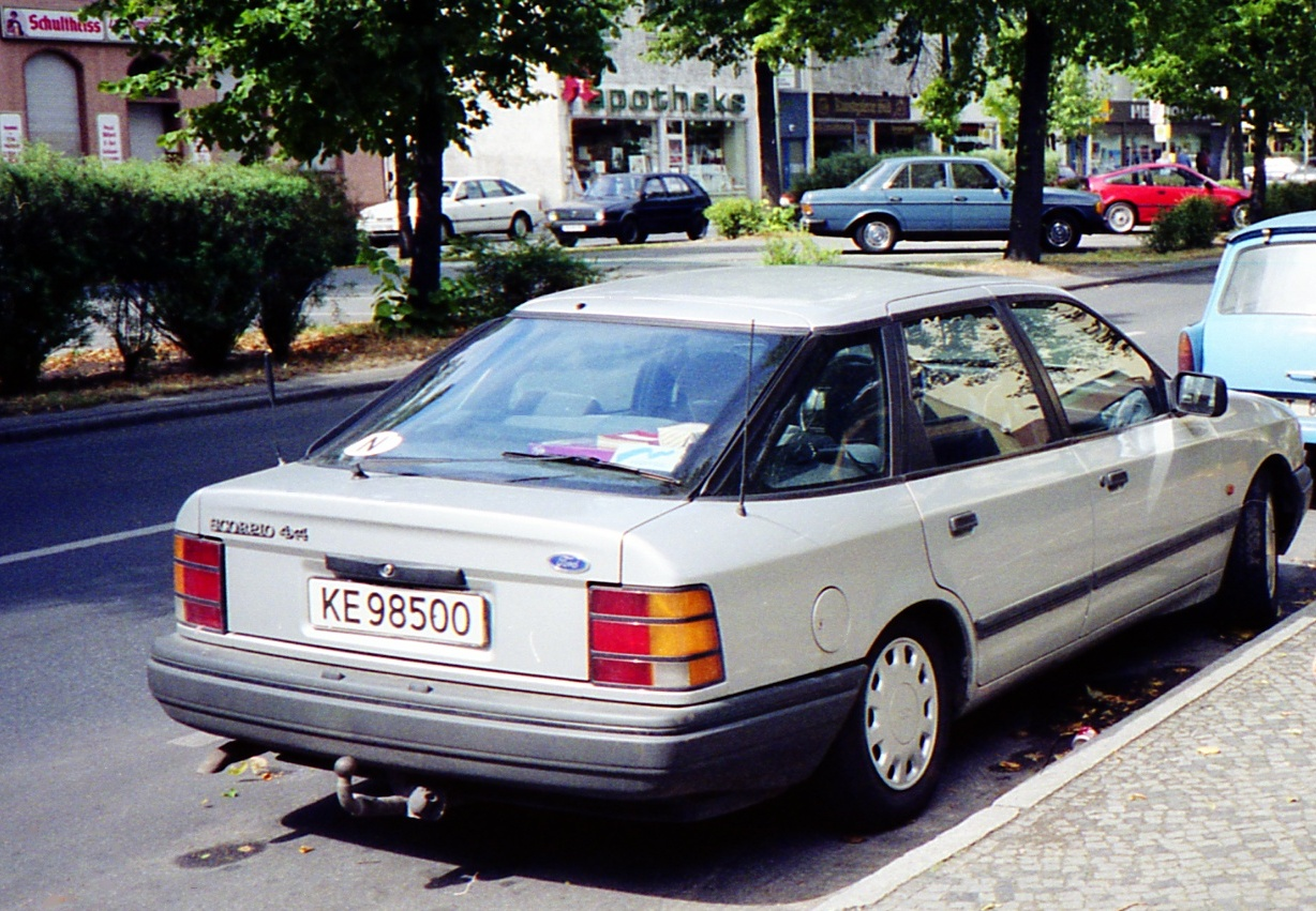 Ford Scorpio model I, napęd 4x4 na ulicach Berlina